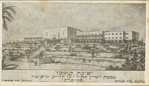 החזית המזרחית של בנין ישיבת פוניבז' במעלה גבעת הישיבה